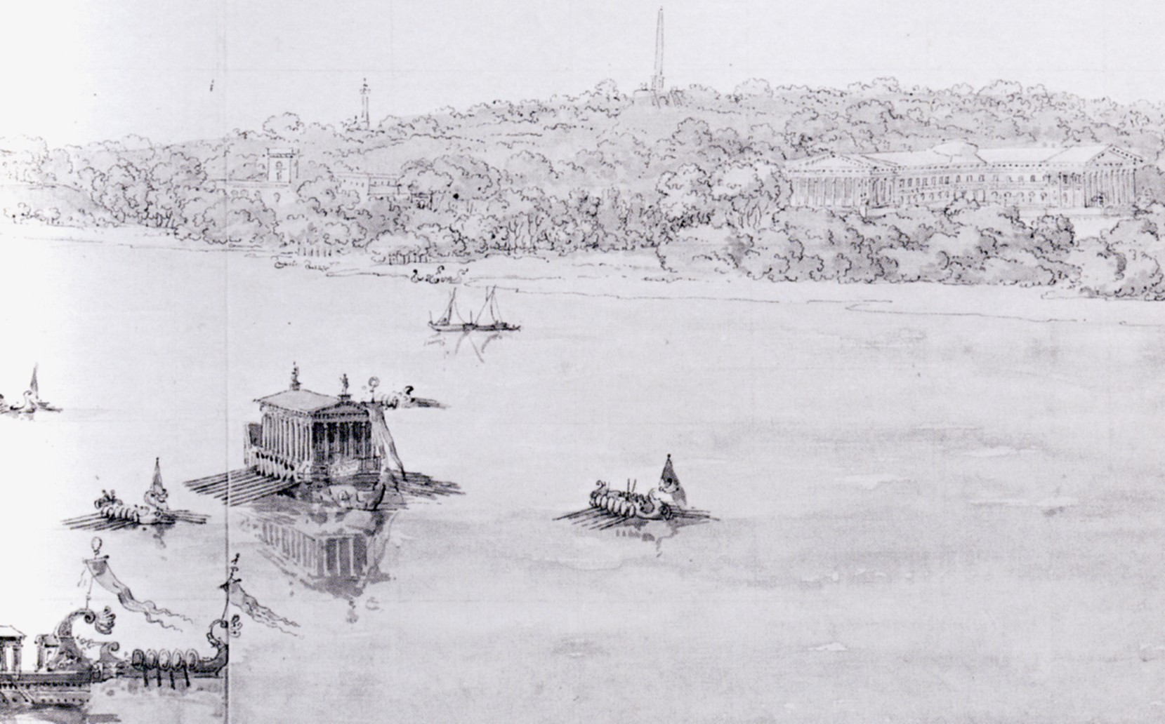 Illustration över Brunnsviken med galären "Lyckans tempel" (bilden är beskuren)